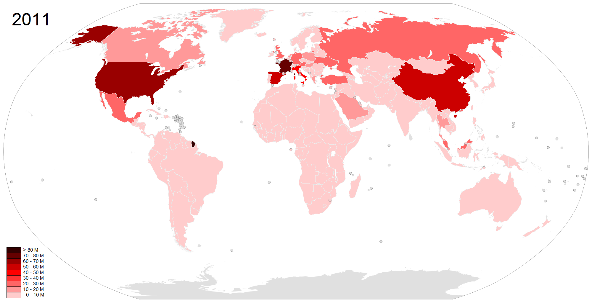 Touristes par pays en 2011.